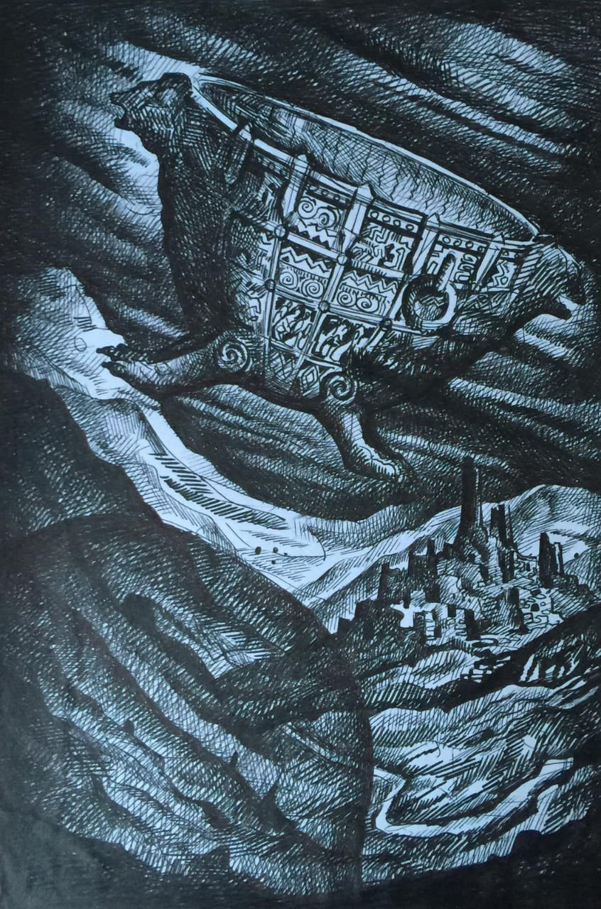 Чеченский котёл